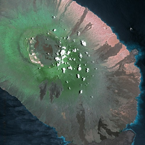 Alcedo Volcano by SPOT Satellite